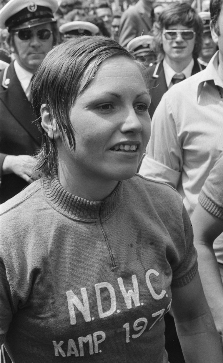 Keetie van Oosten-Hage